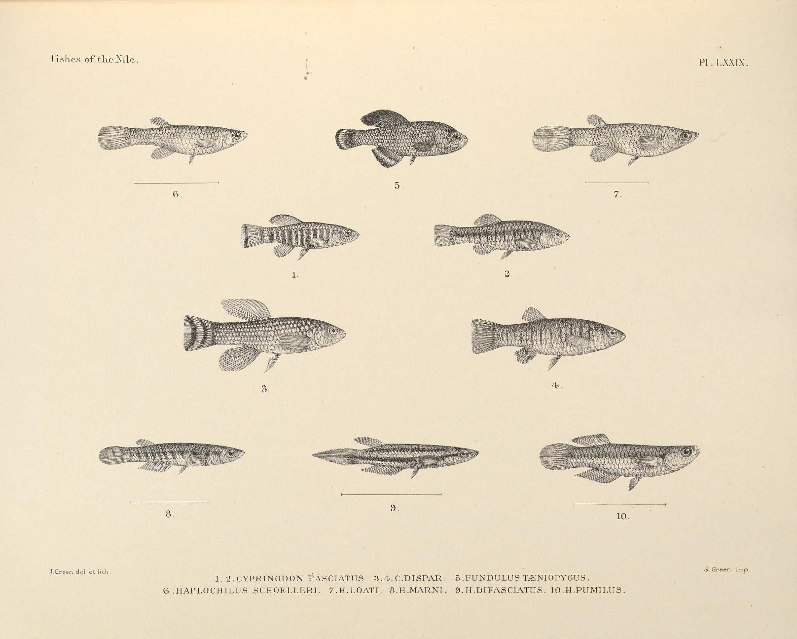 1. Aphanius fasciatus, 2. Aphanius dispar, 3+4. Nothobranchius taeniopygus, 5. Micropanchax loati, 6. Epiplatys spilargyreius, 7. Epiplatys bifasciatus, 8. Lacustricola pumilus